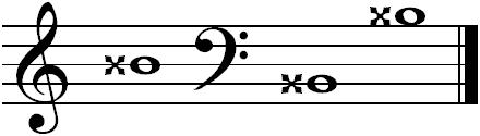 koobak